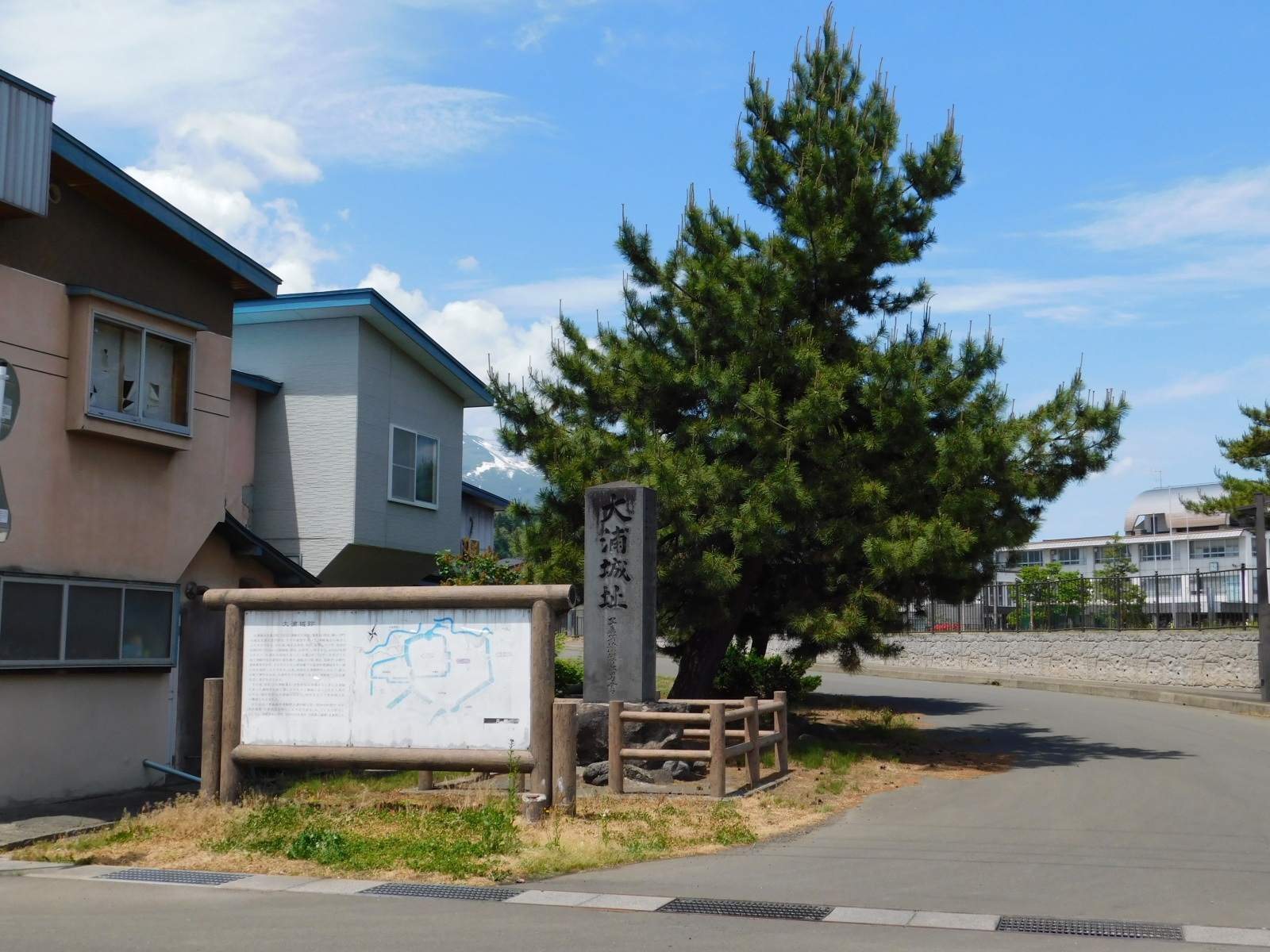 青森県弘前市にある大浦城址の碑。右奥に見えるのは弘前市立津軽中学校の校舎。また、碑の左奥に覗いて見えるのは岩木山。